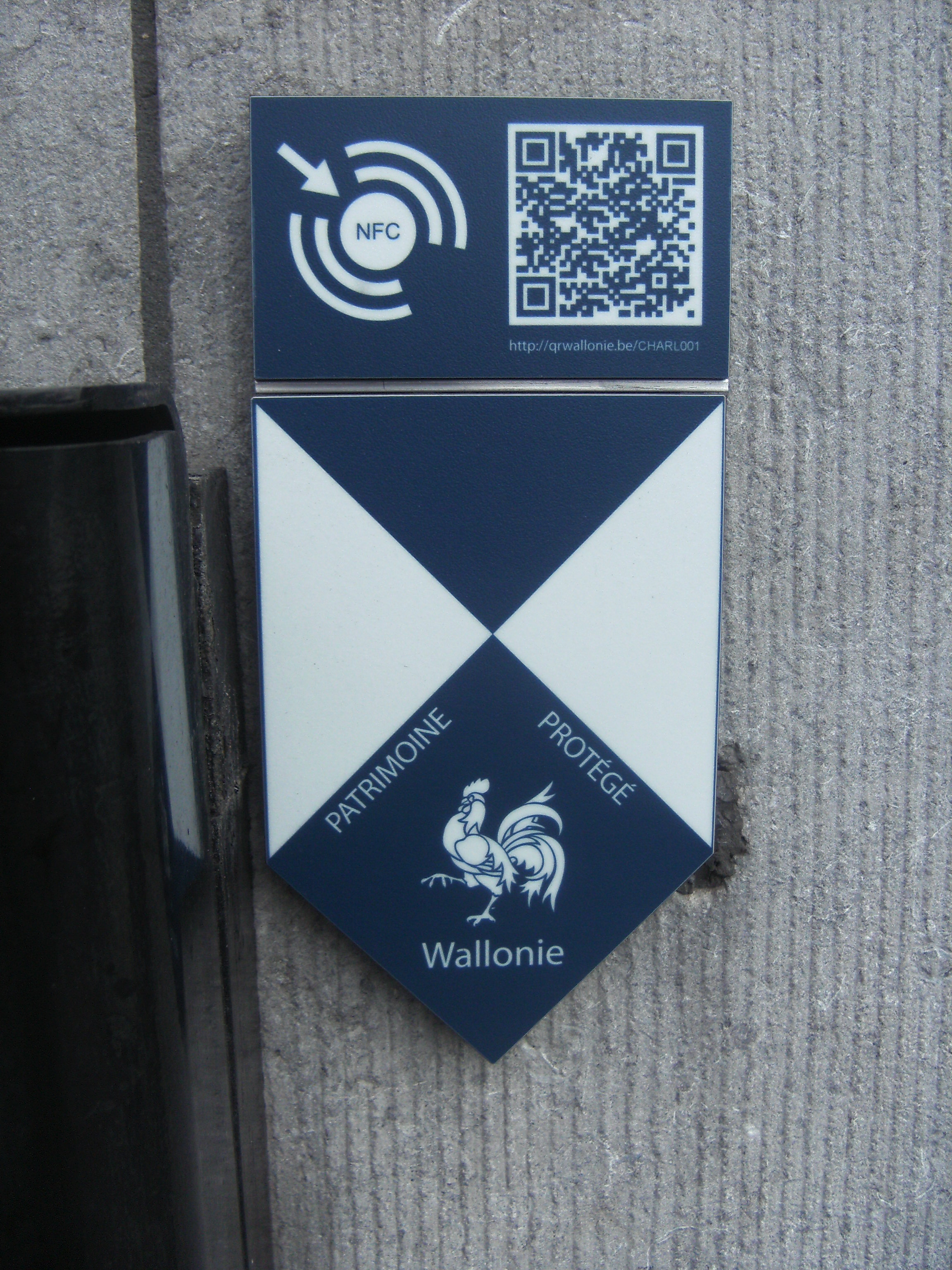 Hôtel de ville de Charleroi (Belgique) - Bouclier bleu apposé sur le bâtiment.